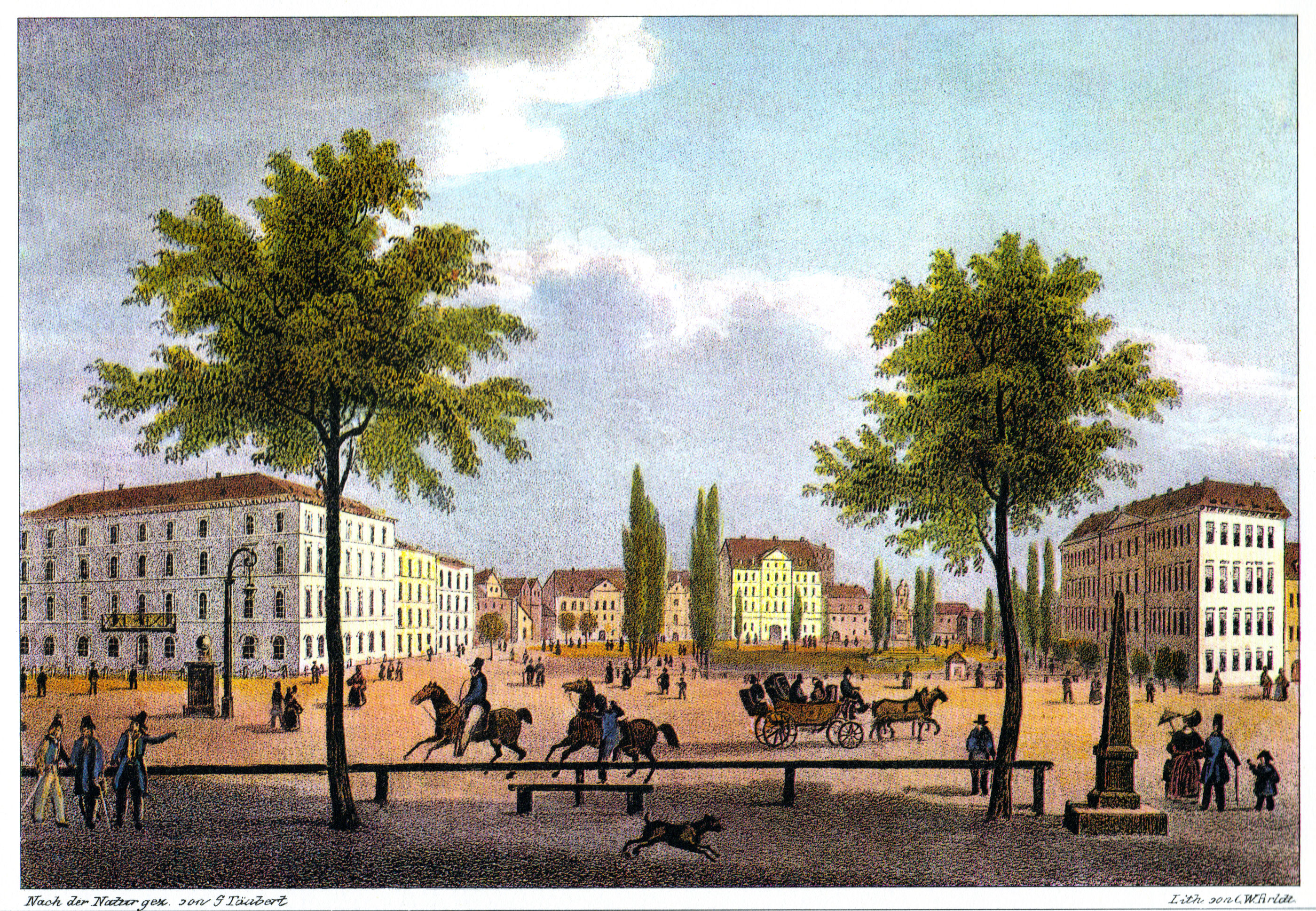 Esplanade around 1840